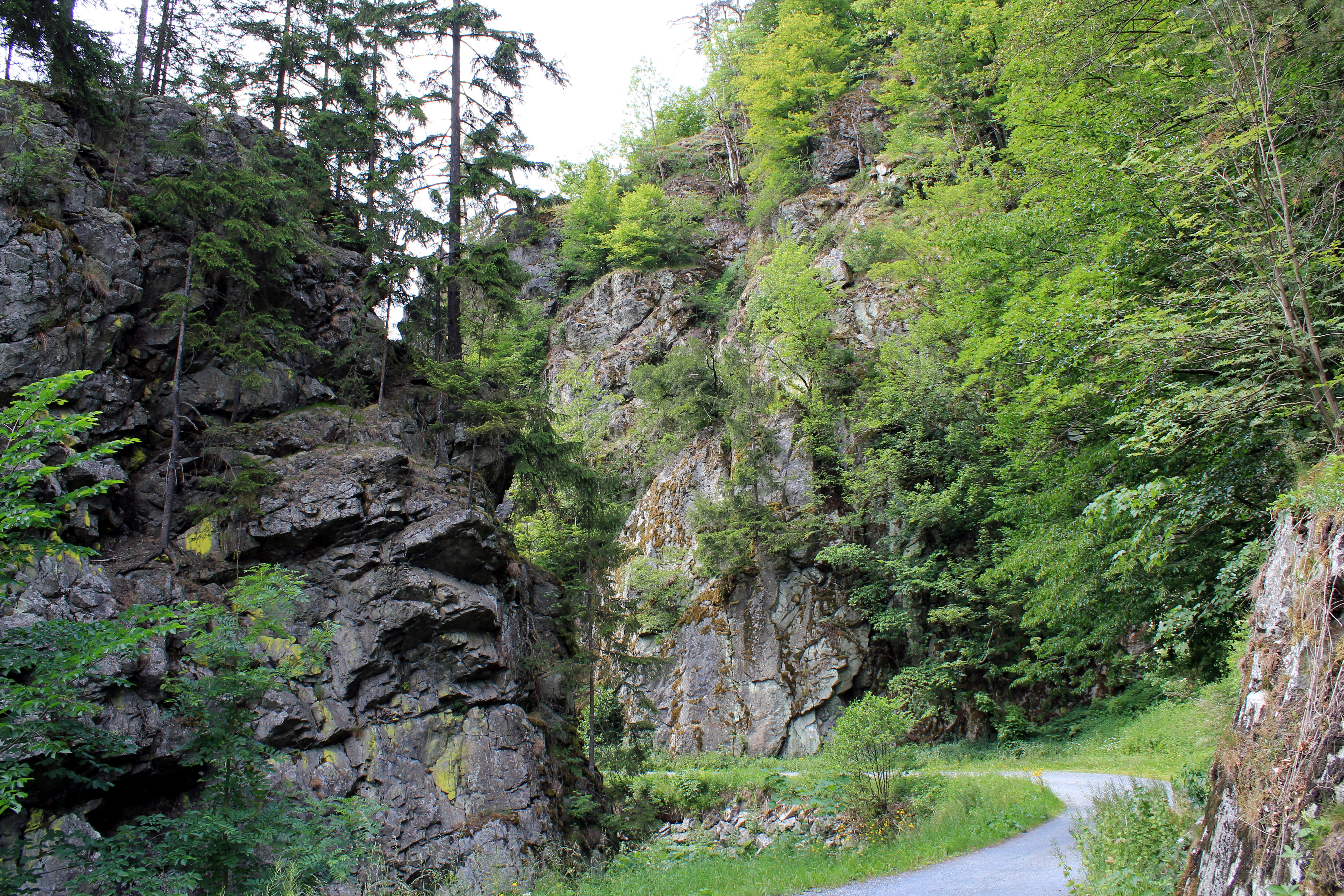 Blick auf die Felsen der Steinachklamm von Osten